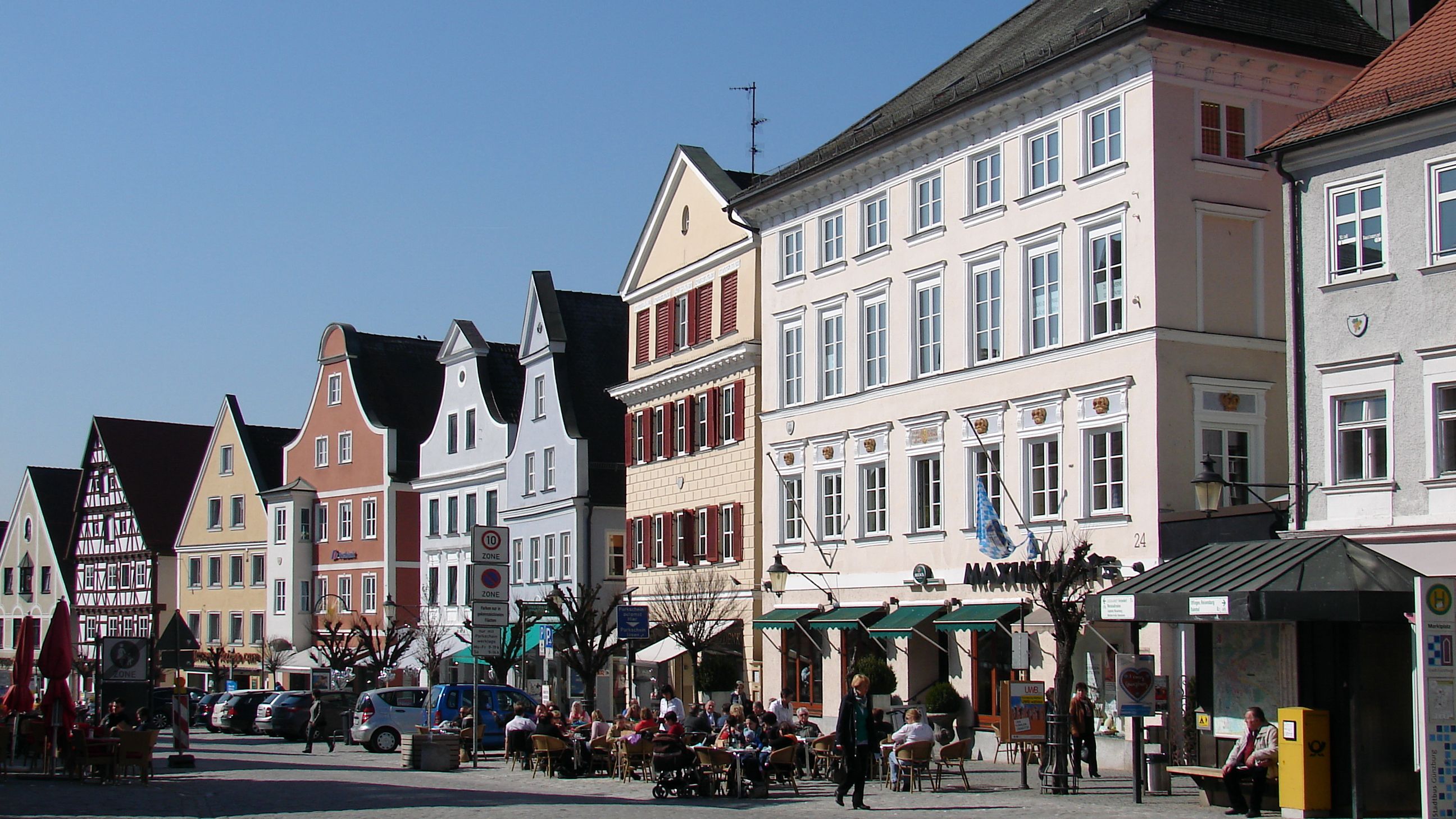 Günzburger Marktplatz